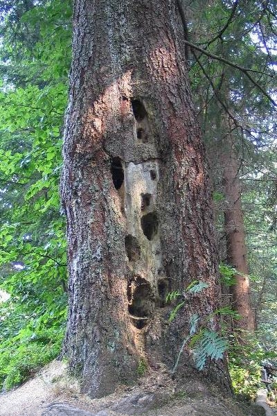 Nadelbaumstamm, fotografiert im August 2004 von soebe Titel: Spechtfutterplatz Foto: soebe, 17.08.2004 (Original text: Auf einer Wanderung von der Elbquelle nach Špindlerův Mlyn fiel mir dieser Baum auf, da er offensichtlich von Spechten bei der Nahrungssuche aufgesucht wurde und dabei "etwas" durchlöchert wurde. Wenn der Baum nicht gefällt wird, wird er allmählich innen ausfaulen und vielleicht Fledermäusen als Quartier dienen. Auch wird wohl die ein oder andere Bockkäferlarve den Spechten entgangen sein.)